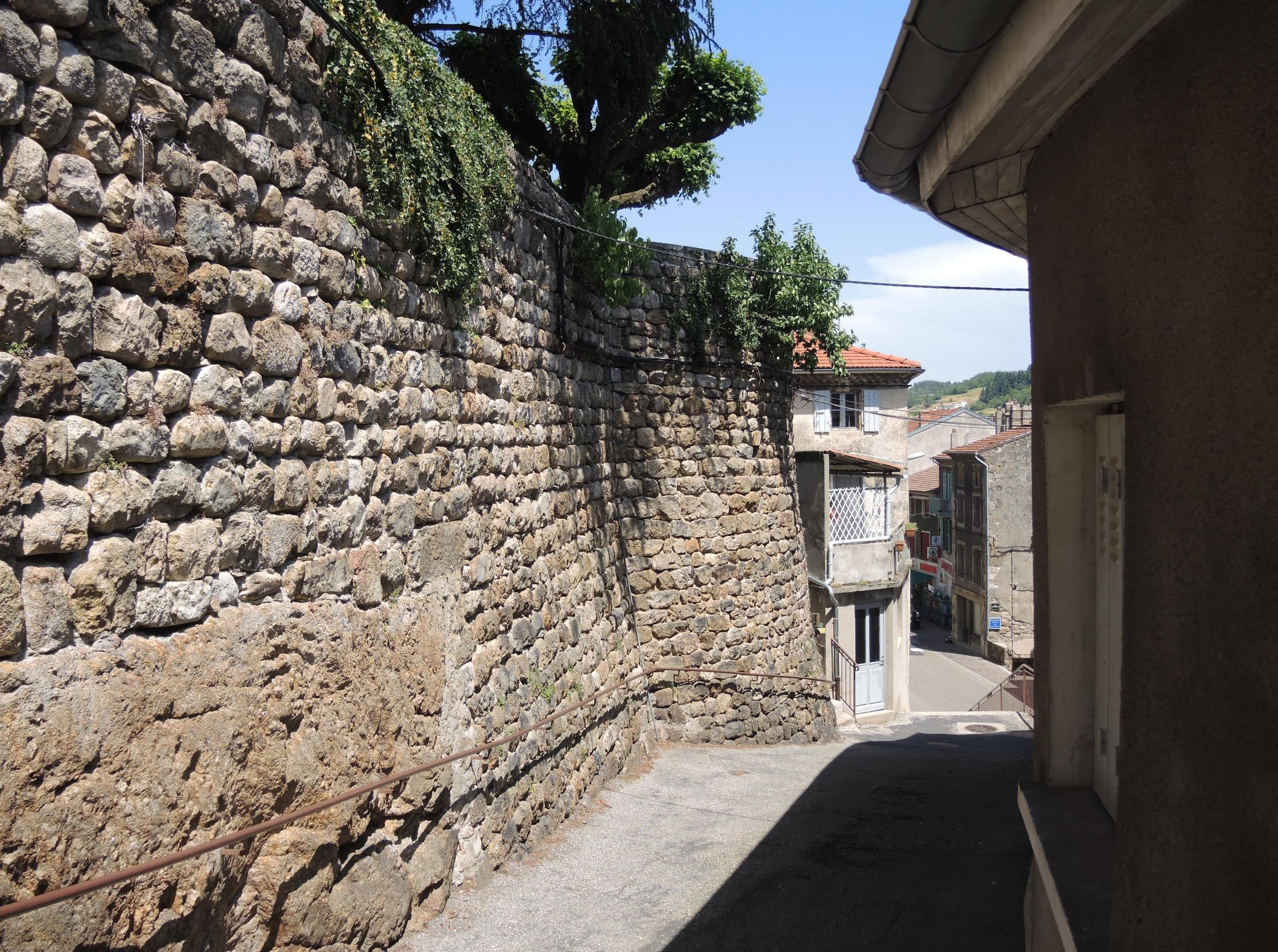 Satillieu remparts